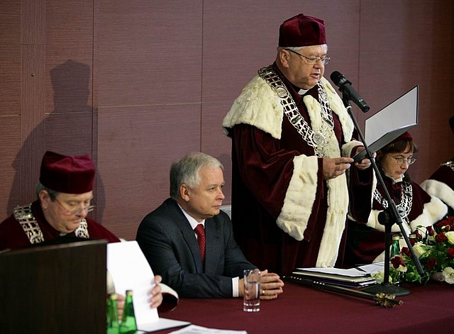 W poniedziałek, 5 października 2009 roku, prezydent Lech Kaczyński wziął udział w inauguracji roku akademickiego 2009/2010 na Uniwersytecie Kardynała Stefana Wyszyńskiego w Warszawie.